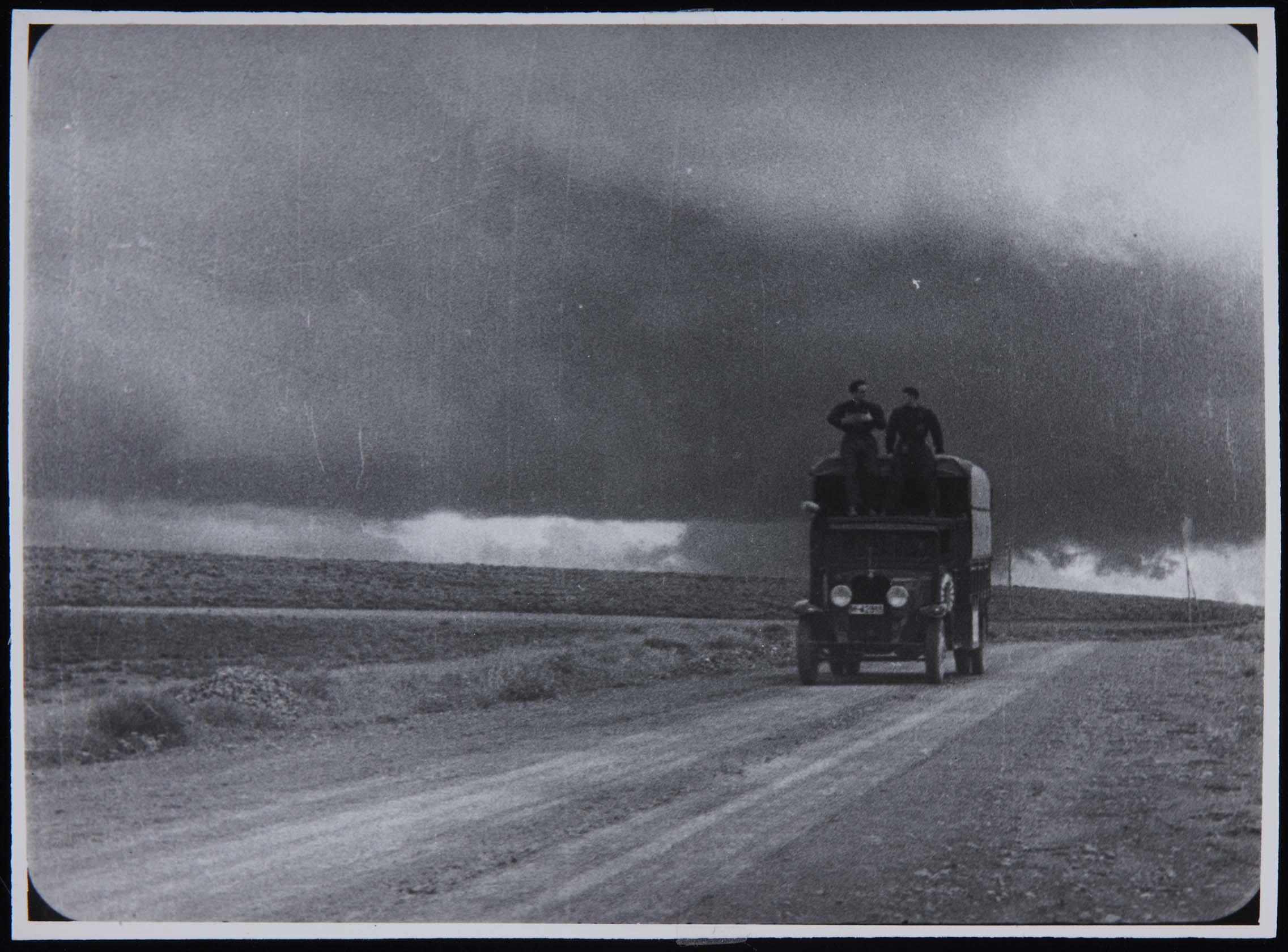 Camión de montaje de La Barraca (1932). Fotografía anónima. Colección del Museo Nacional Centro de Arte Reina Sofía, Madrid, España